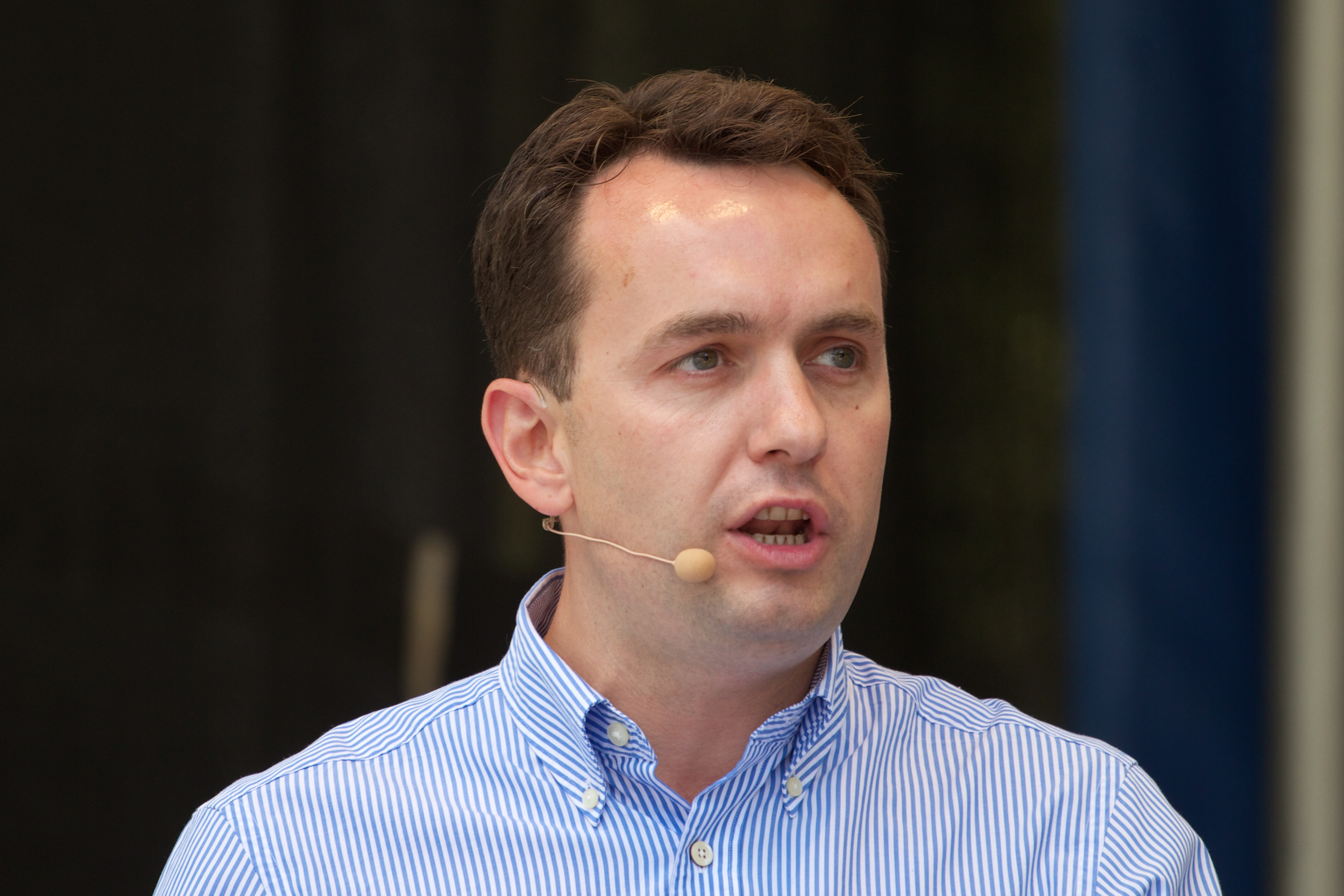 Stian Berger Røsland